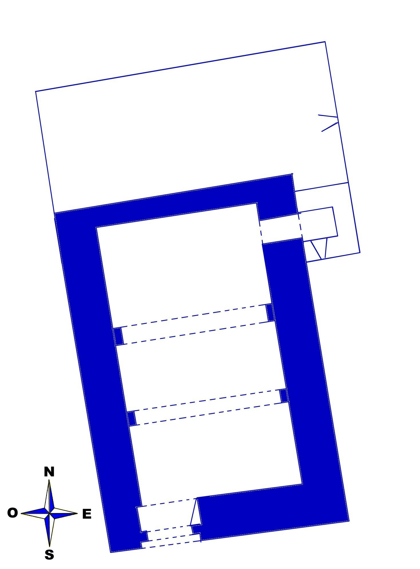 Croquis de la planta del santuari de la Mare de Déu de Puig-aguilar, al terme de la Corriu (municipi de Guixers, comarca del Solsonès).